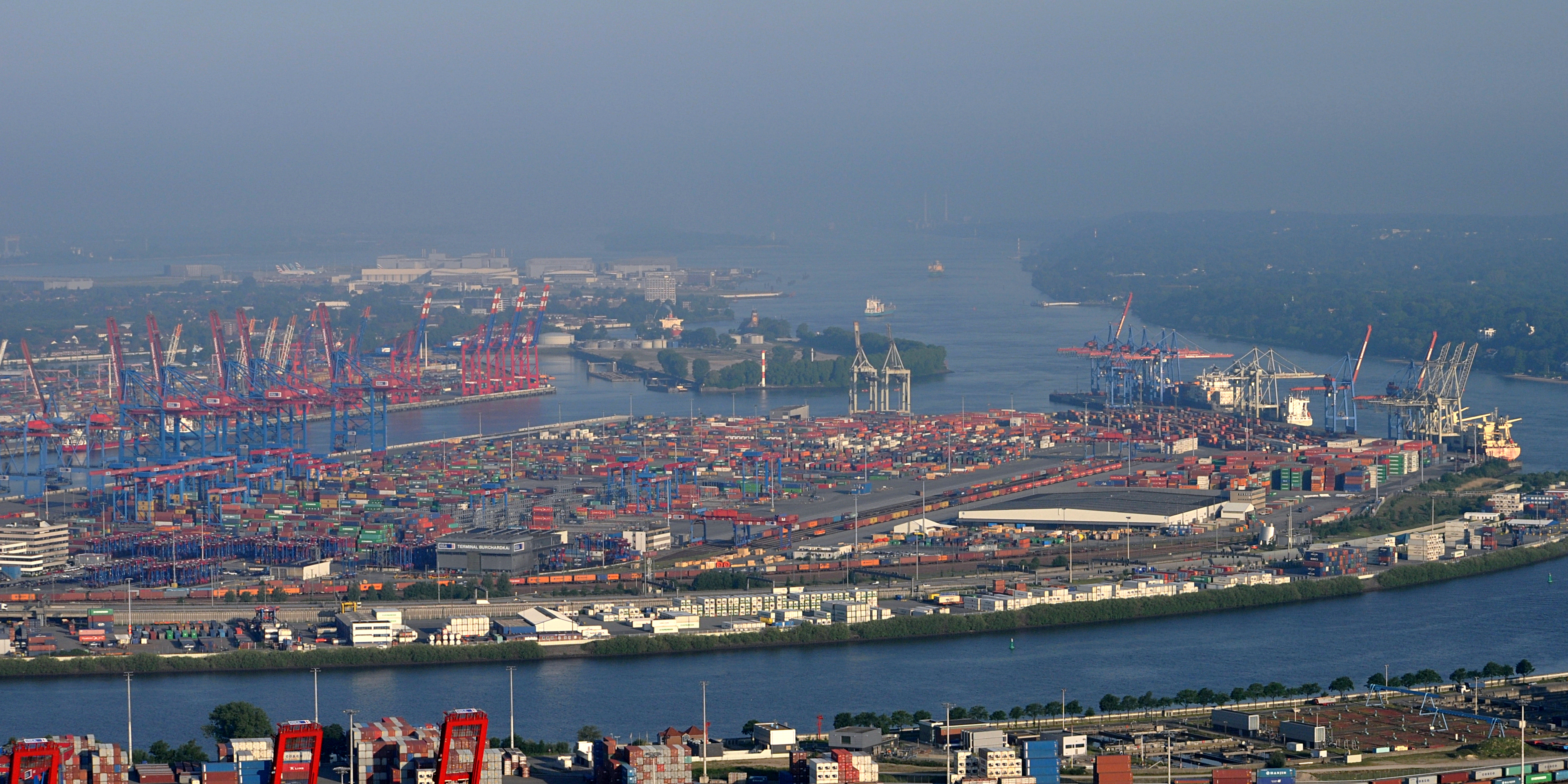 Containerterminal Burchardkai in Hamburg-Waltershof.